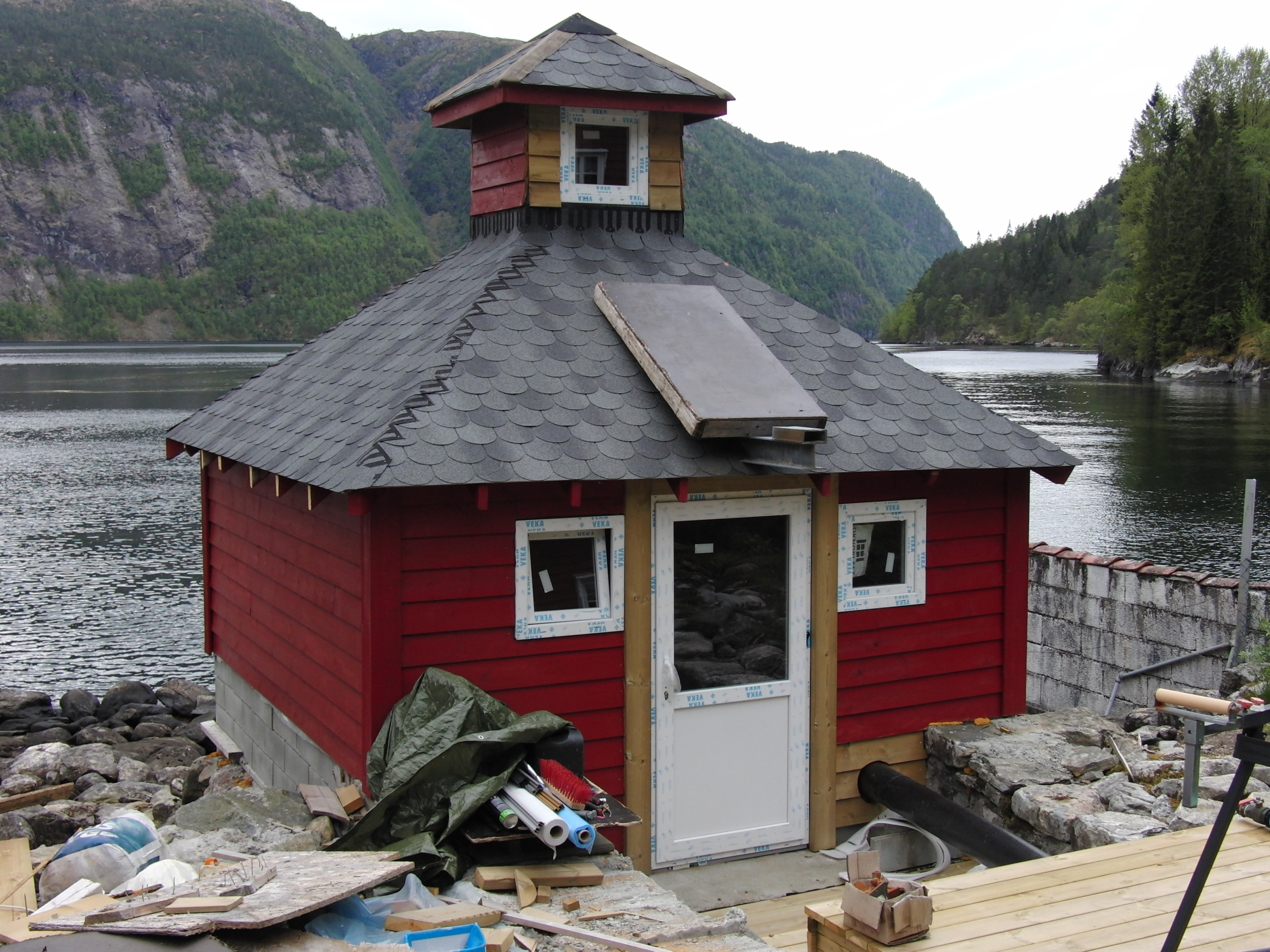 Nottveit Pico kraftverk